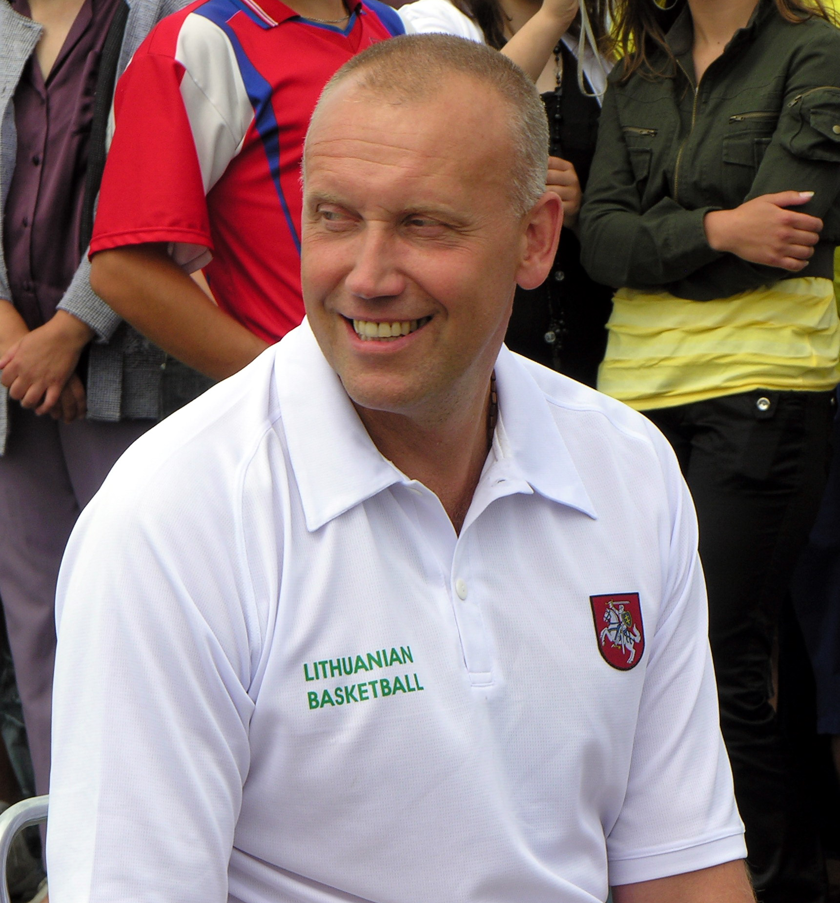 Rimas Kurtinaitis, Nacionalinės vyrų krepšinio rinktinės susitikimo Mažeikiuose metu 2009 m. liepos 31 d.